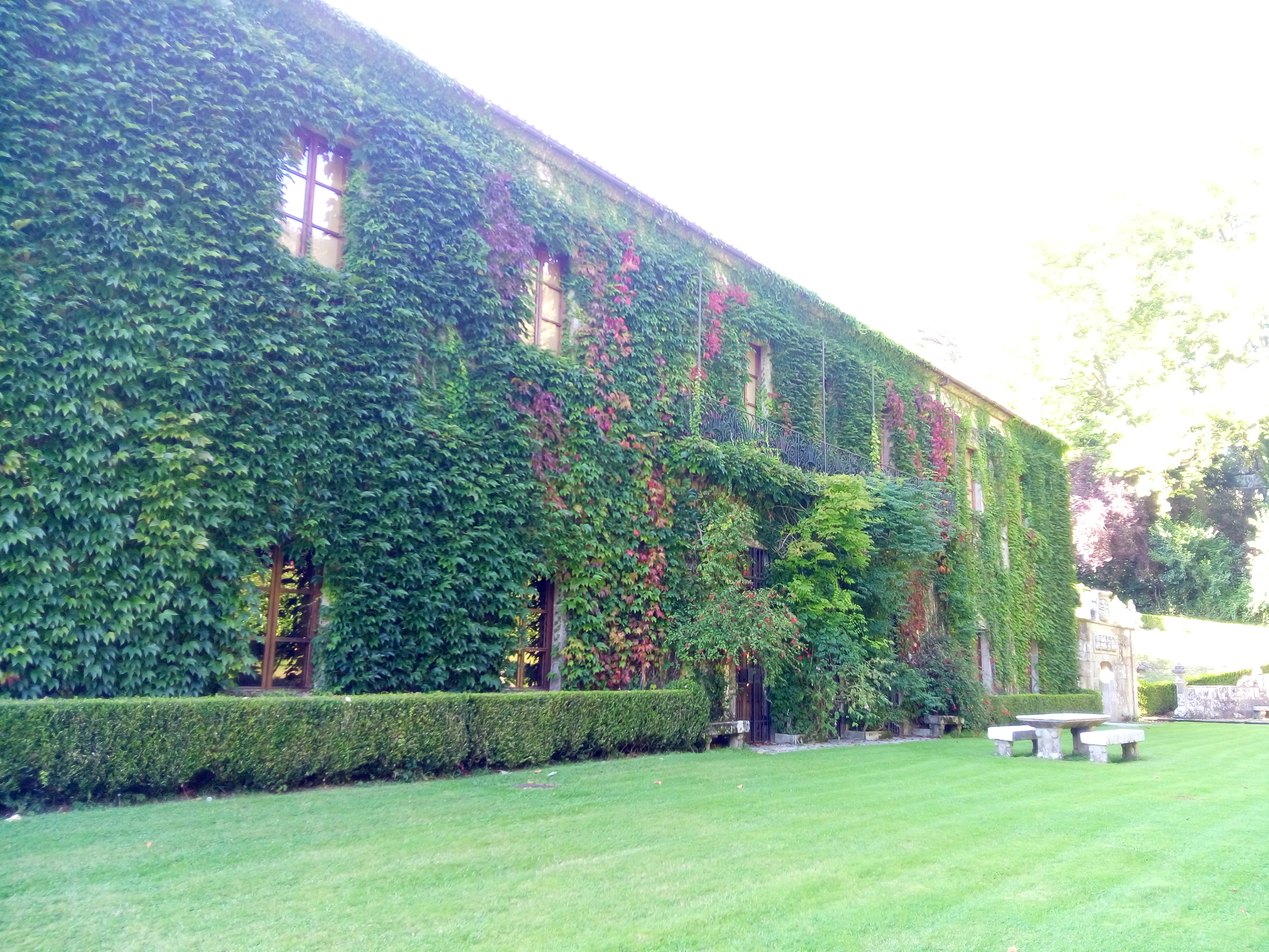 Pazo de Meirás